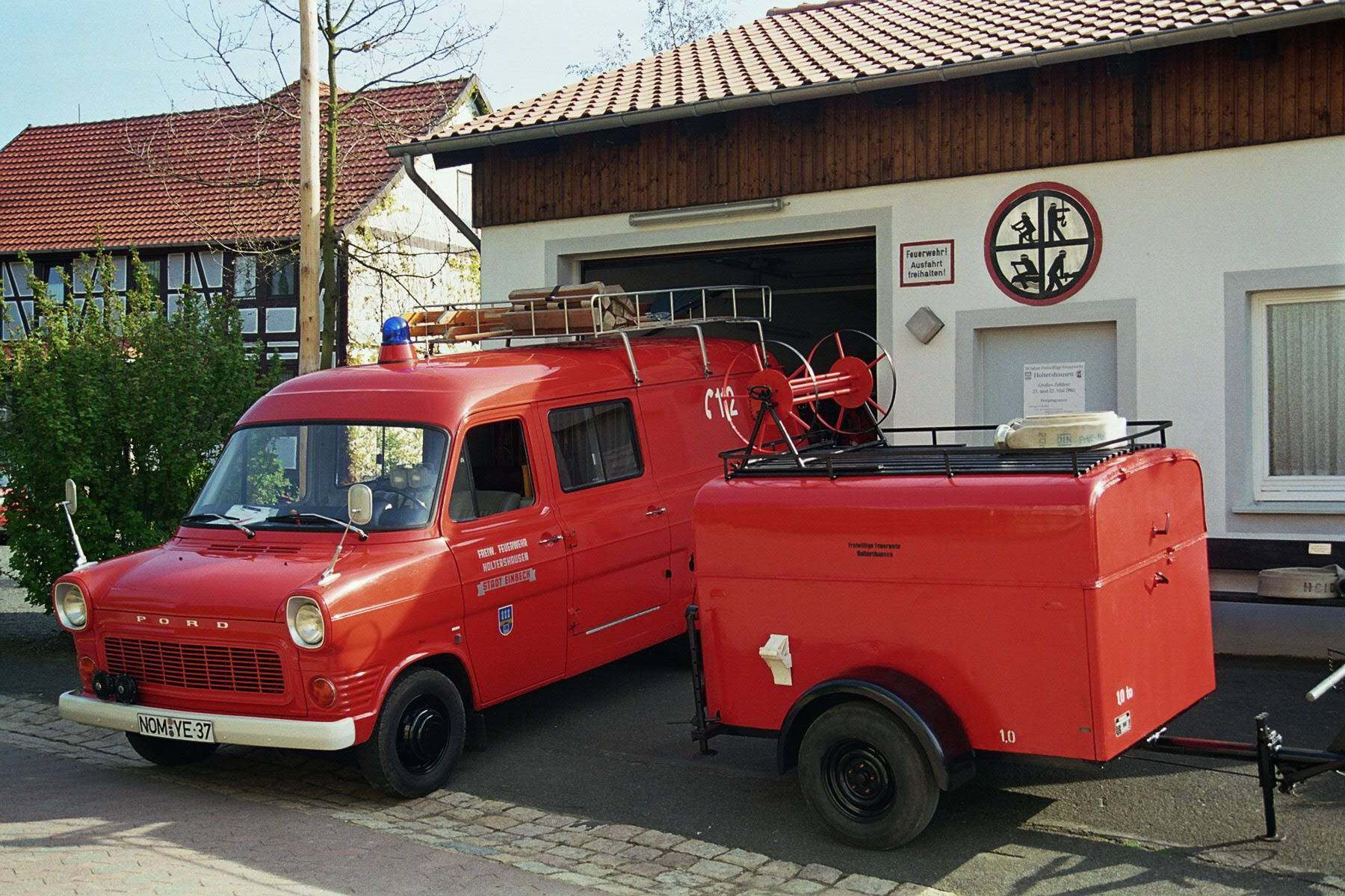 TSF und TSA der Ortsfeuerwehr Holtershausen (Stand Mai 2005)